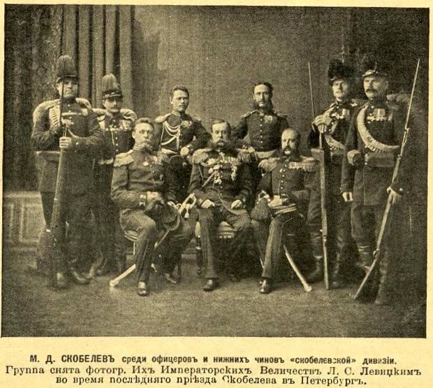 М. Д. Скобелев среди офицеров и нижних чинов «скобелевской» дивизии.